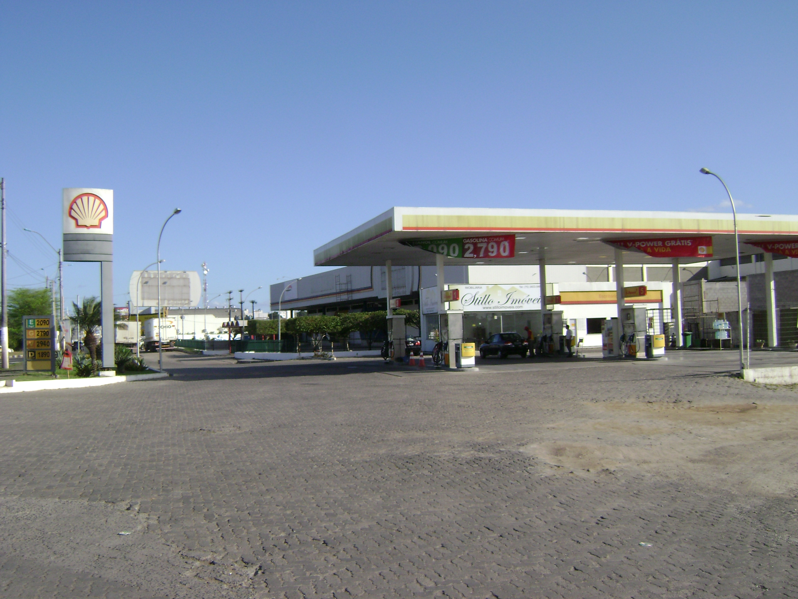 Posto de gasolina da Royal Dutch Shell em Feira de Santana, Bahia, Brasil.